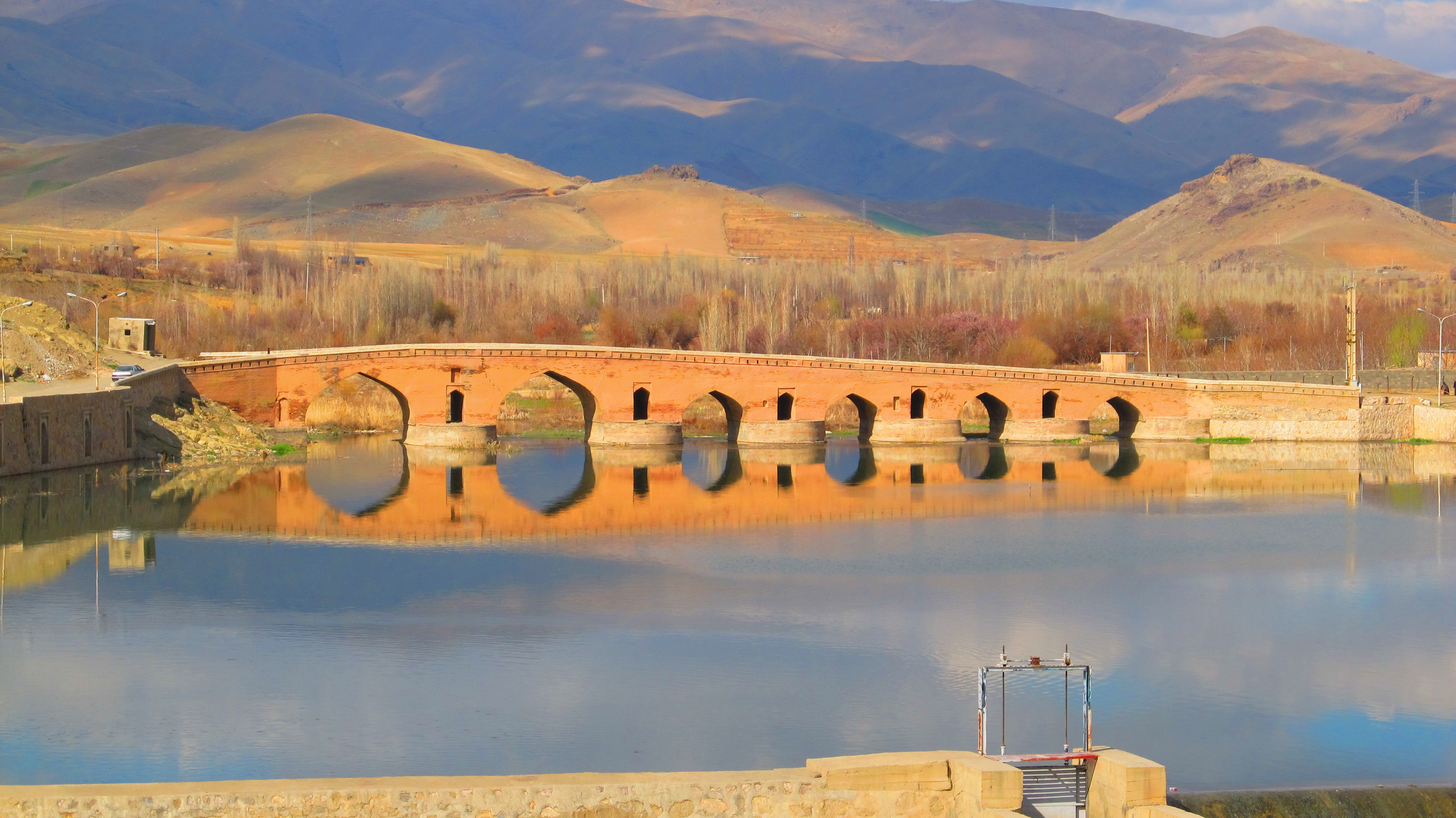 پل قشلاق